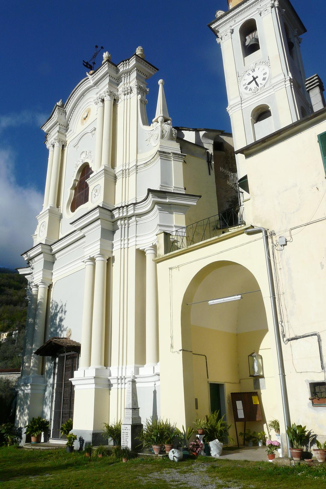 Chiesa dei S.S. Vincenzo e Anastasio, Stellanello, Liguria, Italia